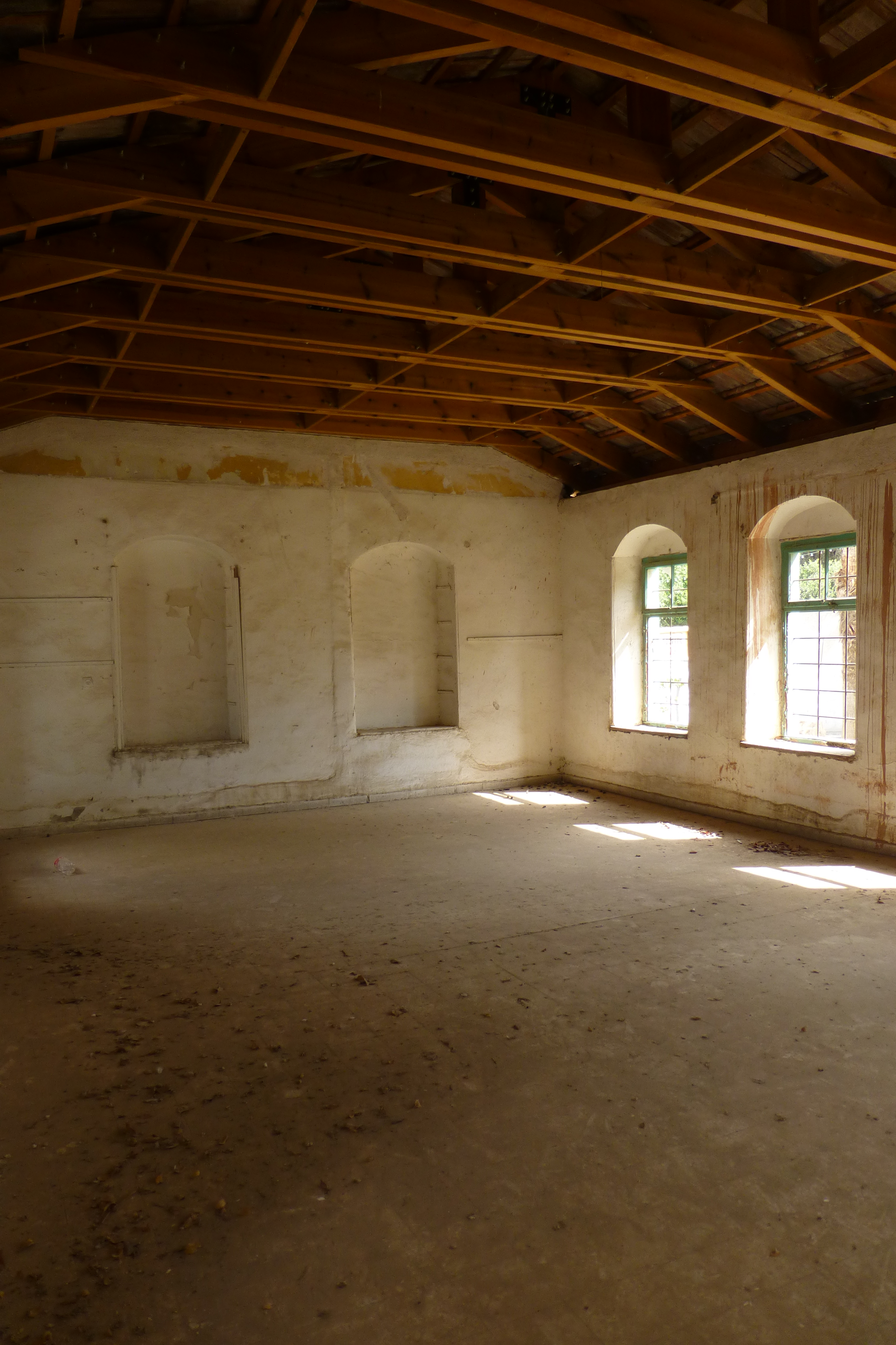 ביתם של מינה בנימין פוקס, מהבתים הראשונים במושבה. מבנה בן קומה שנבנה ב-1888 מאבני כורכר. ב-1970 עבר המבנה לידי "בני ברית" ושימש כמועדון לנוער וקשישים. מ-2004 עומד נטוש ומיועד לשימור כחלק ממתחם המוזיאון לתולדות גדרה.